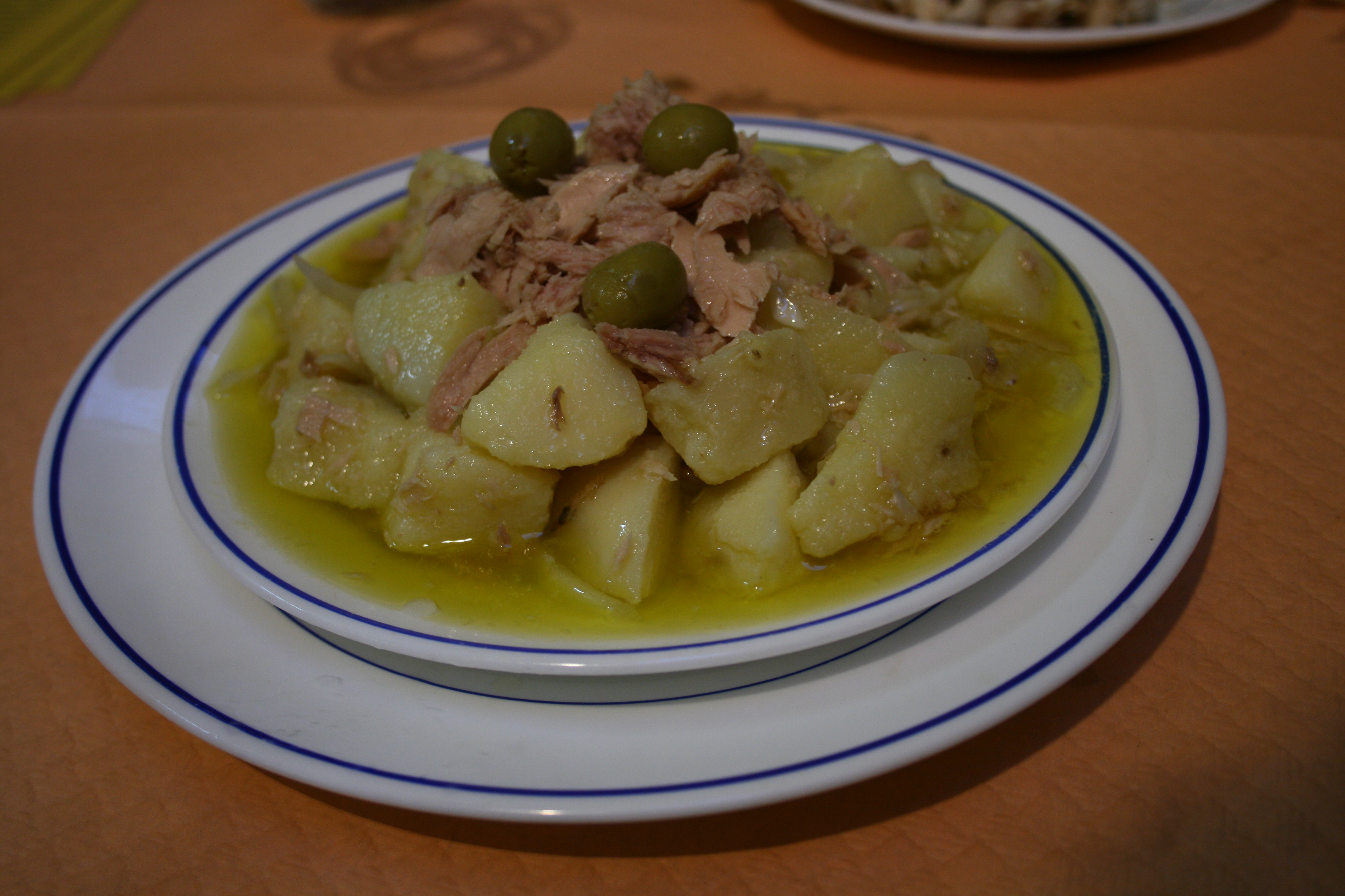 Papas aliñás